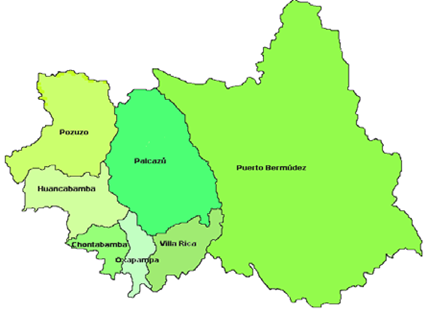 Este mapa muestra los Distritos de la Provincia de Oxapampa.